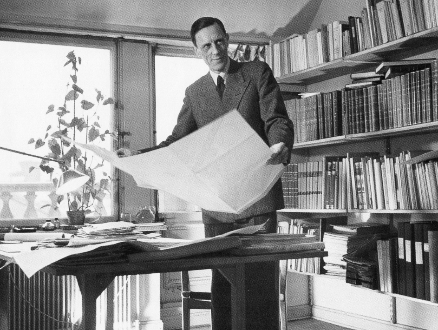 Arkitekt Paul Hedqvist i sitt arbetsrum på Birger Jarlsgatan